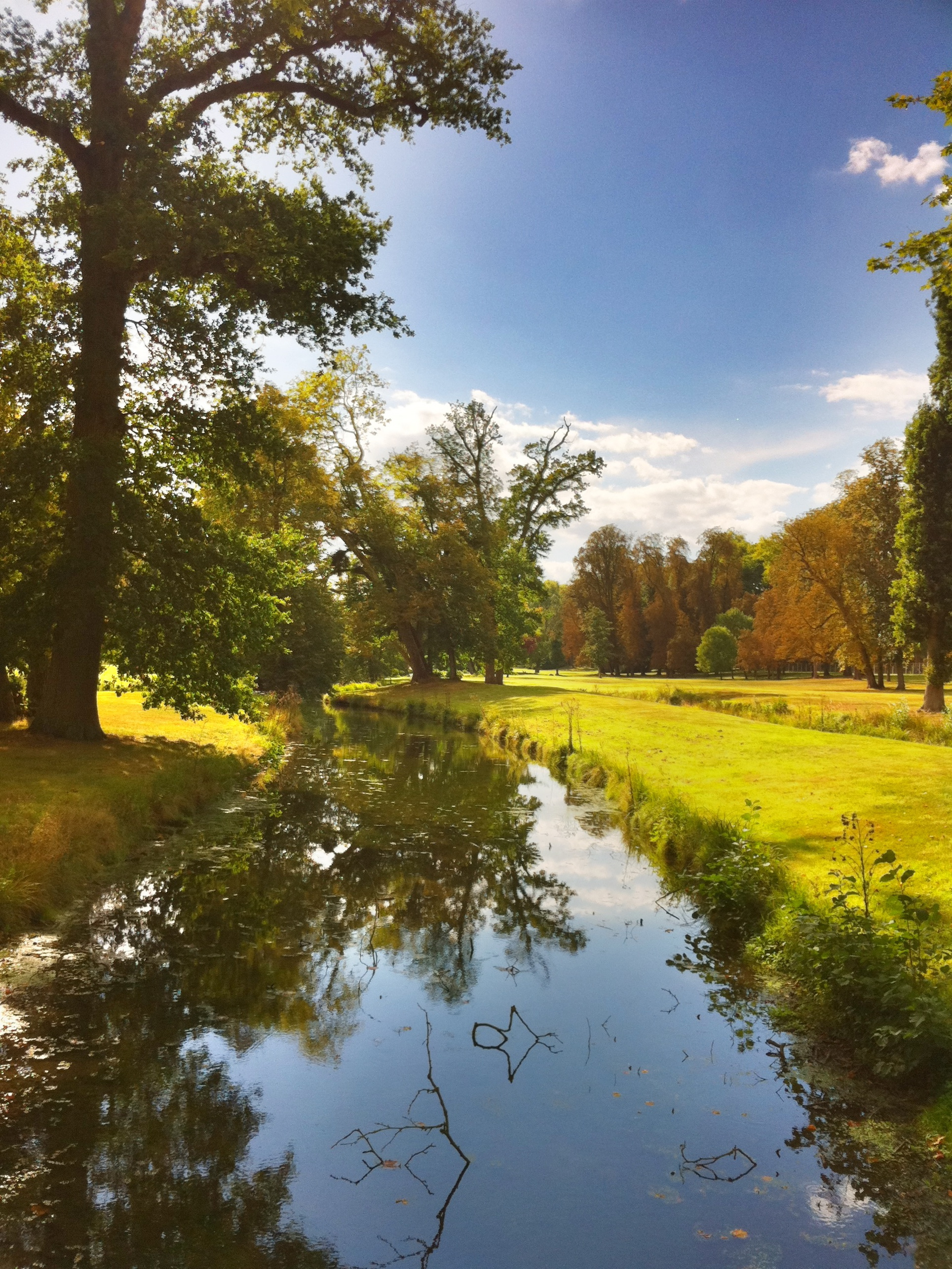 Vue du parc du chateau